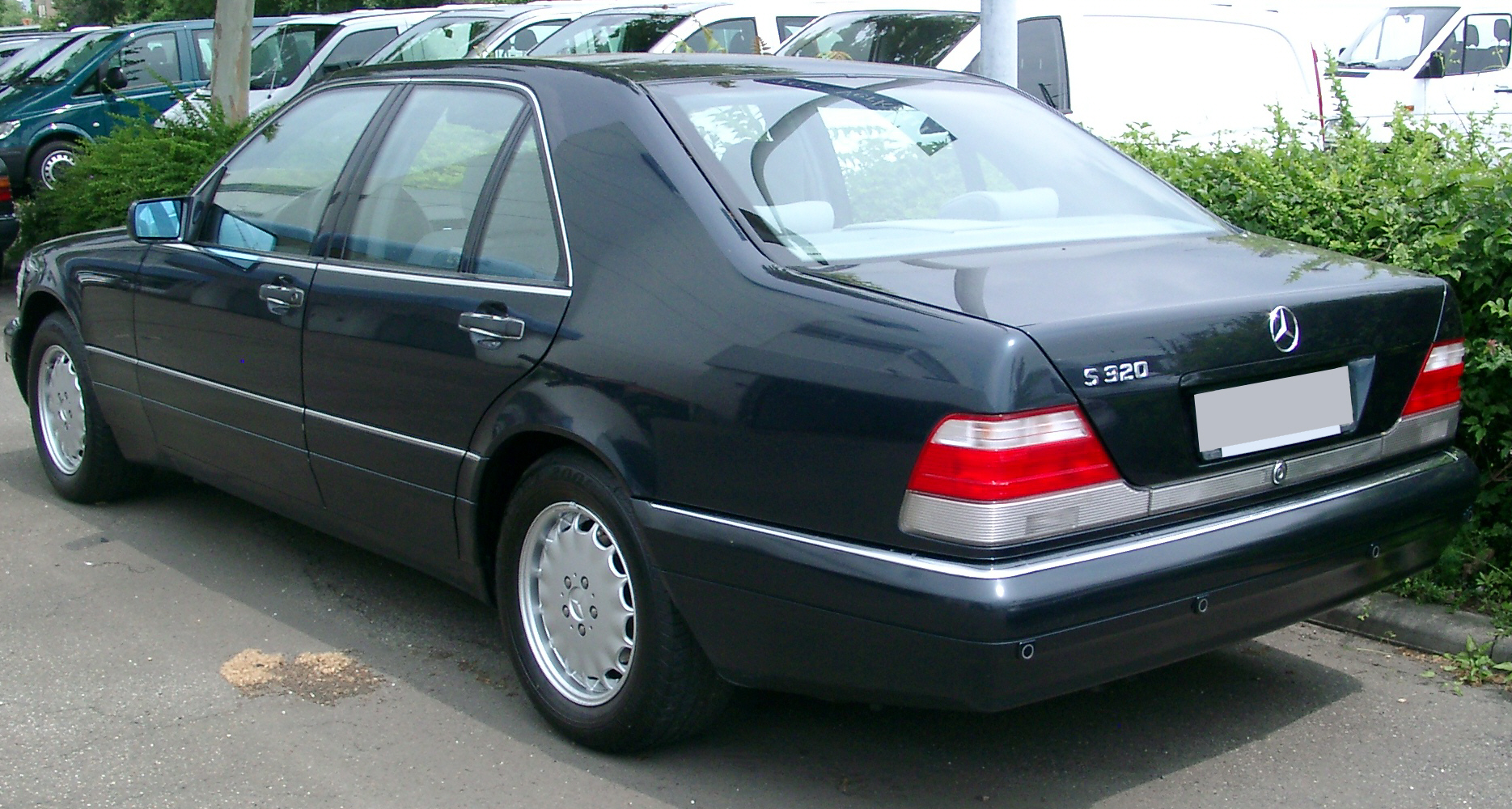 Mercedes-Benz Baureihe 140